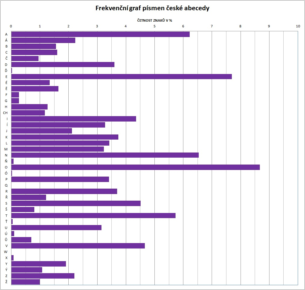 frekvenční graf písmen